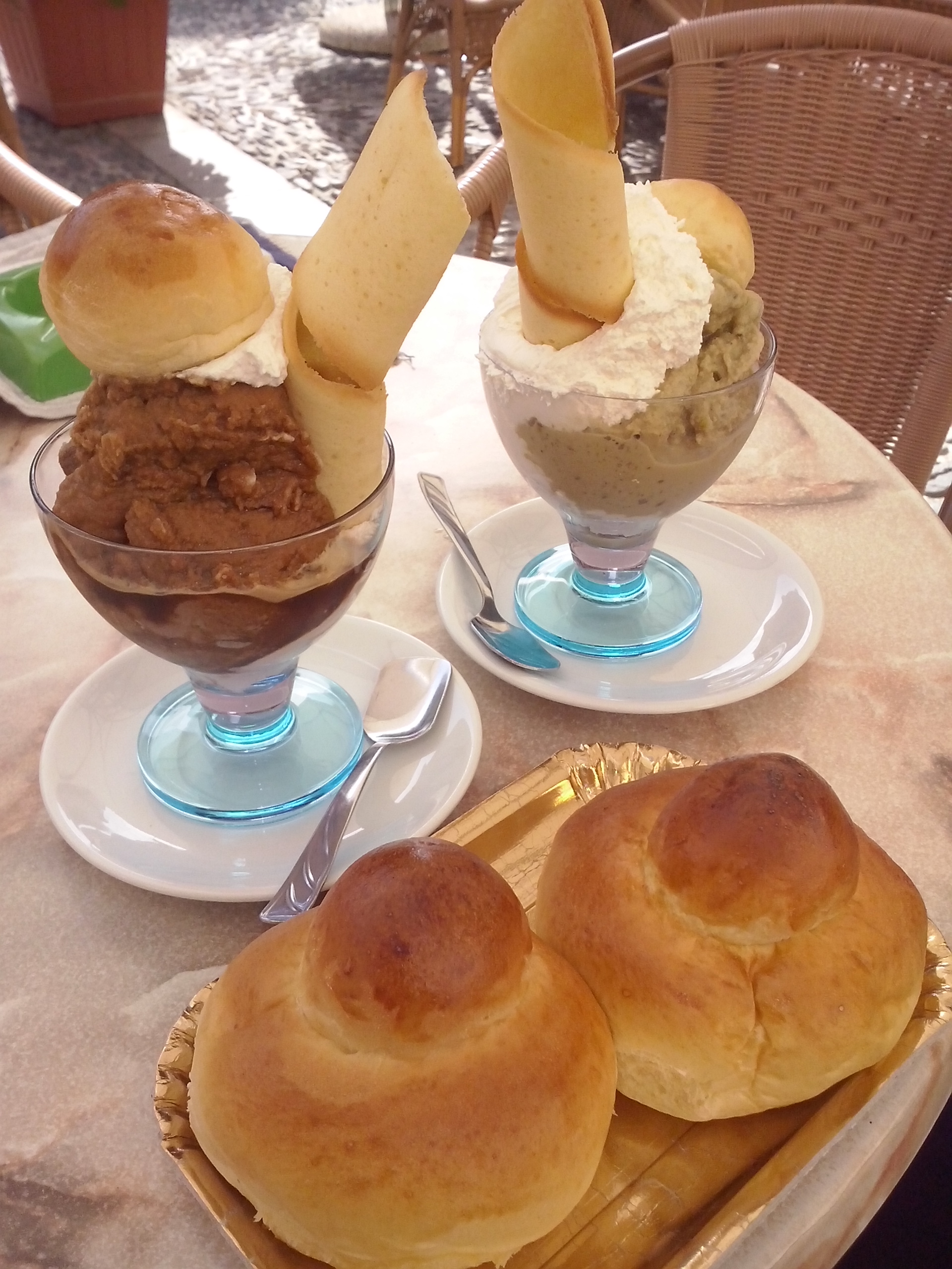 Granita al caffè e al pistacchio con brioscia col tuppo